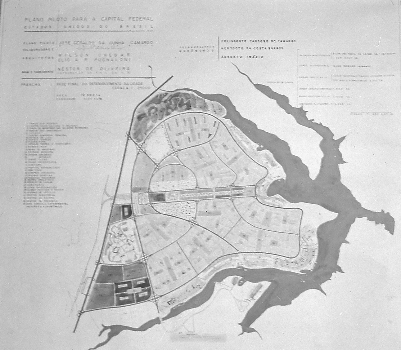 Imagem do Fundo Agência Nacional, do Arquivo Nacional